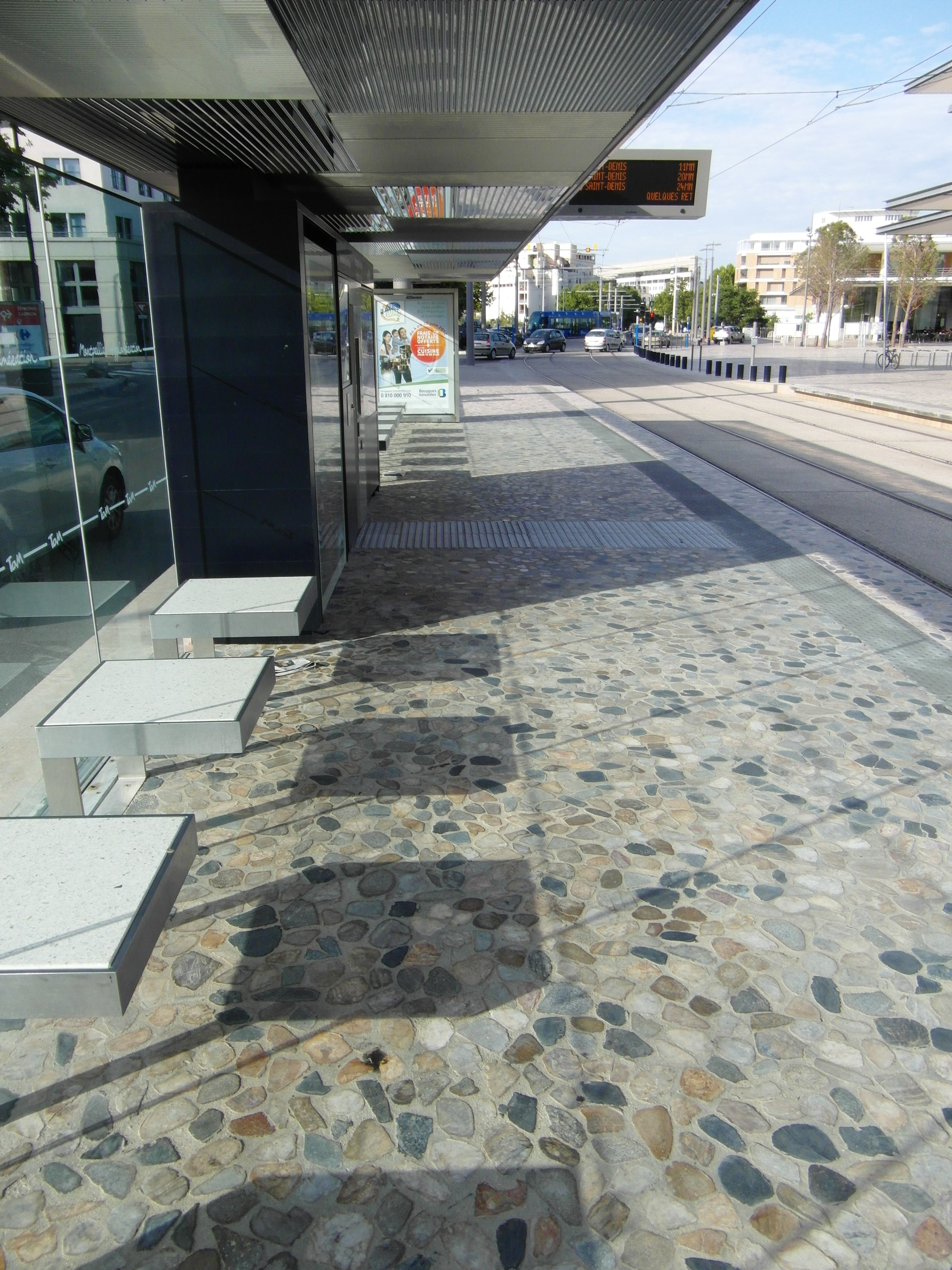 Montpellier - Tramway - Ligne 4 - Hôtel de Ville